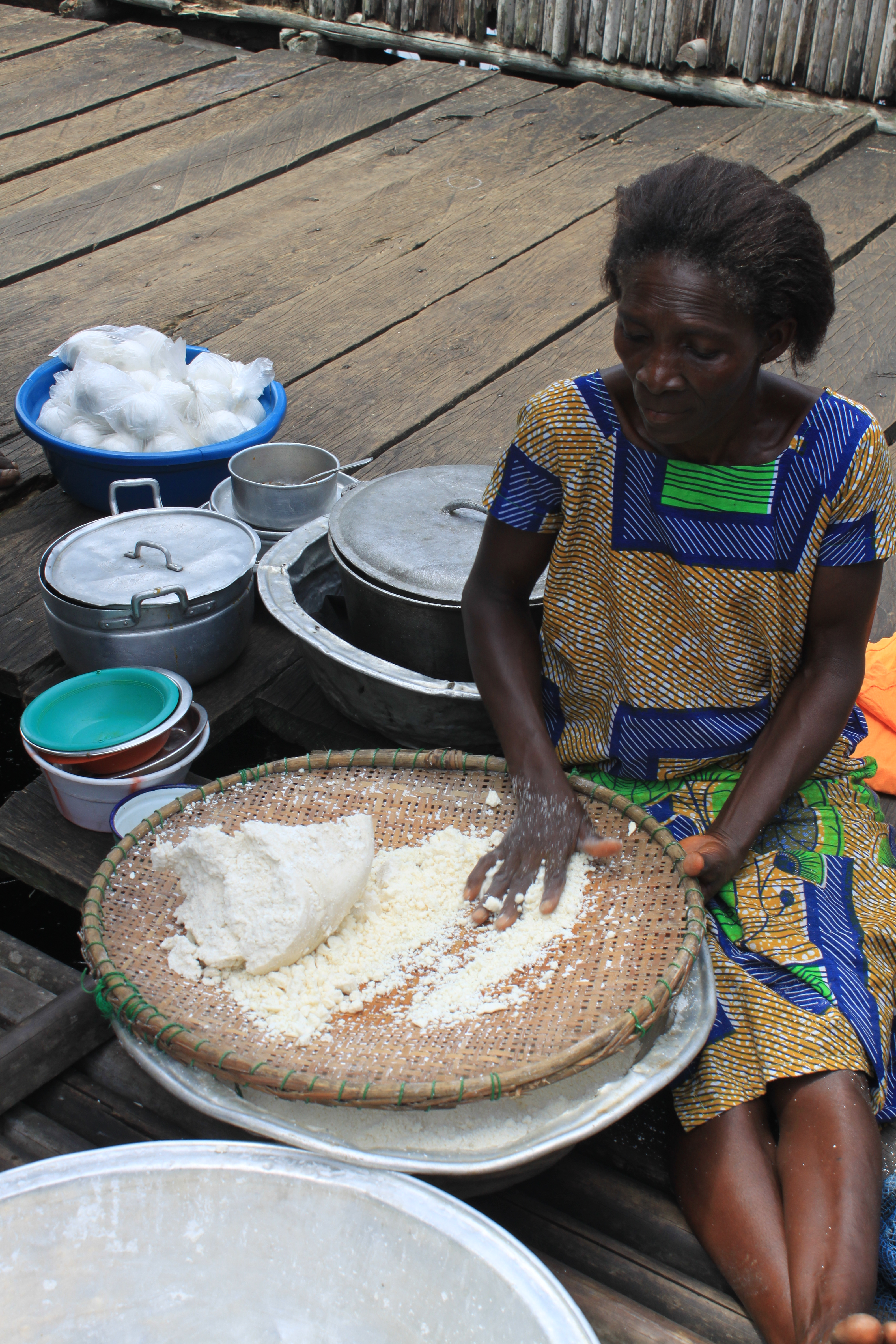 Préparation de la farine de cassave, Ghana.